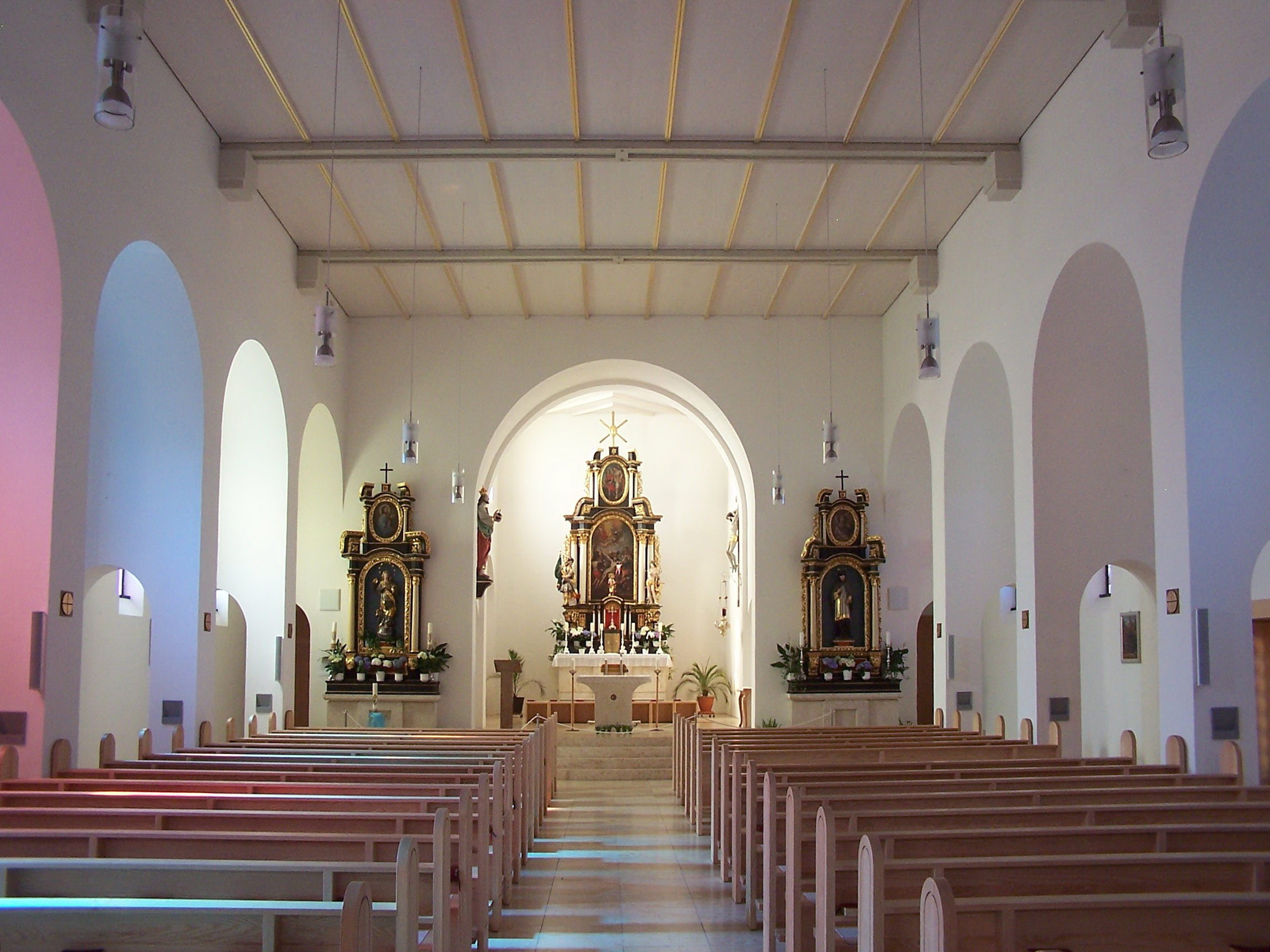 Wörth an der Isar. Landshuter Straße 55. Katholische Pfarrkirche St. Laurentius. 1936-38 nach Norden als Wandpfeilersaal modern erweitert durch Michael Simon, München. Flachgedecktes Kirchenschiff. Runder Chorbogen. Drei barocke Altäre, die aus der alten Kirche übernommen wurden.